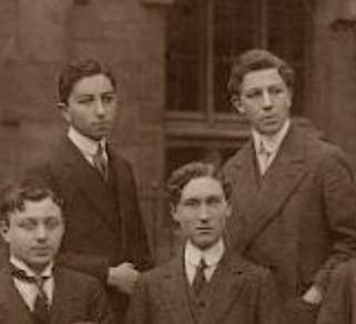 Photo de classe lycée Chaptal (Paris). Agrandissement du fichier original : en haut, à gauche André Breton, à sa droite Théodore Fraenkel.